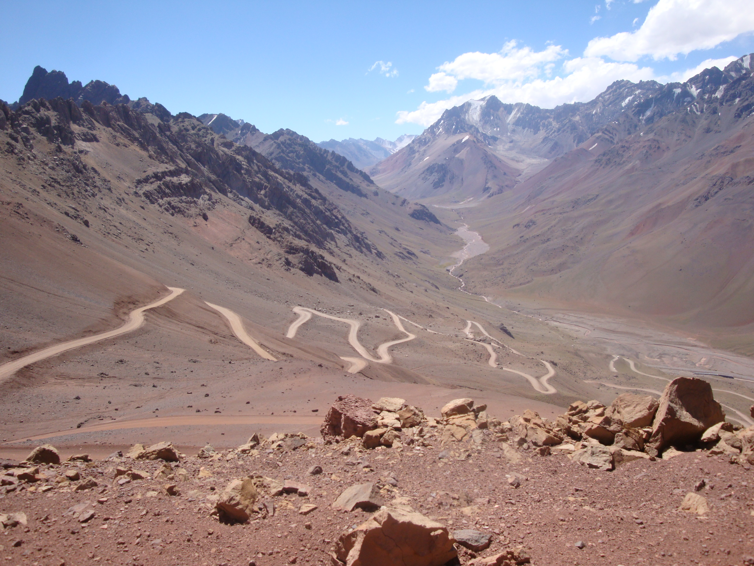 Camino de acceso al Cristo Redentor en la Provincia de Mendoza, Argentina.